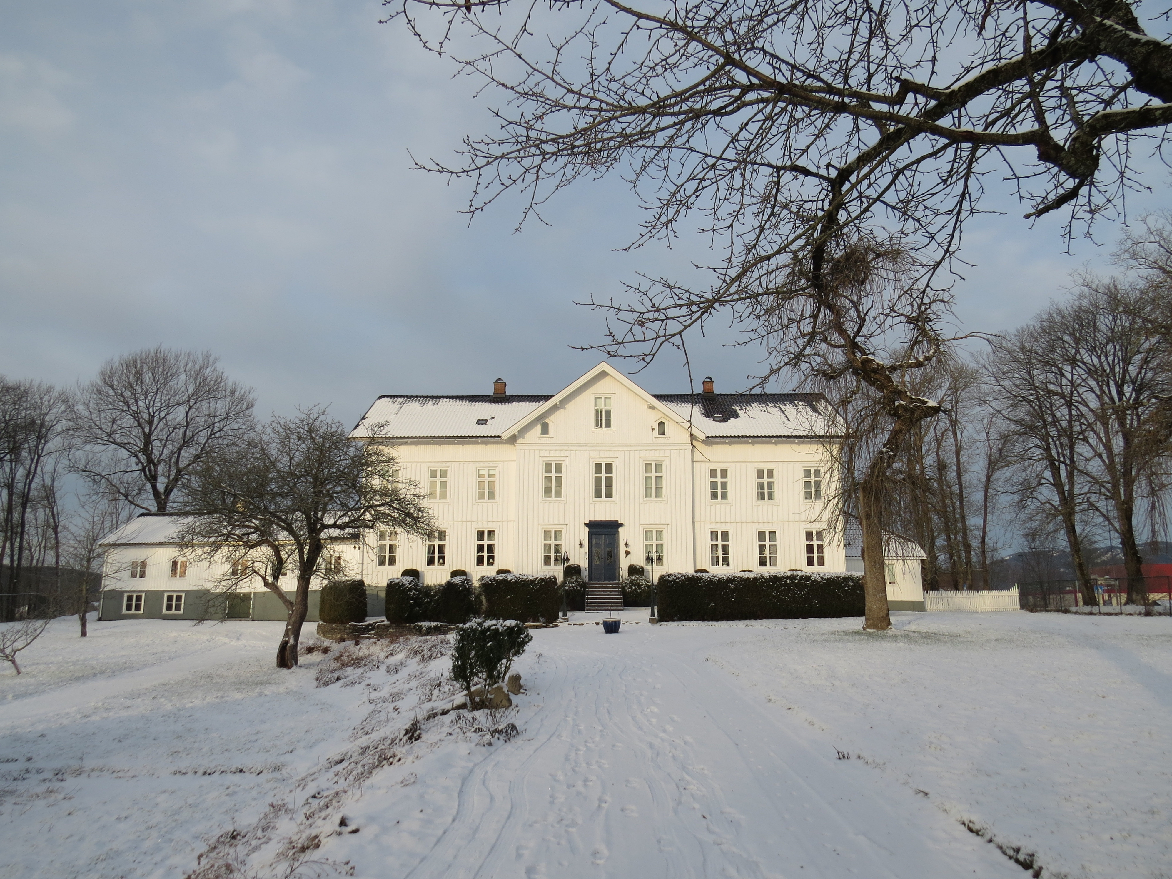 Mæla Gård i Skien